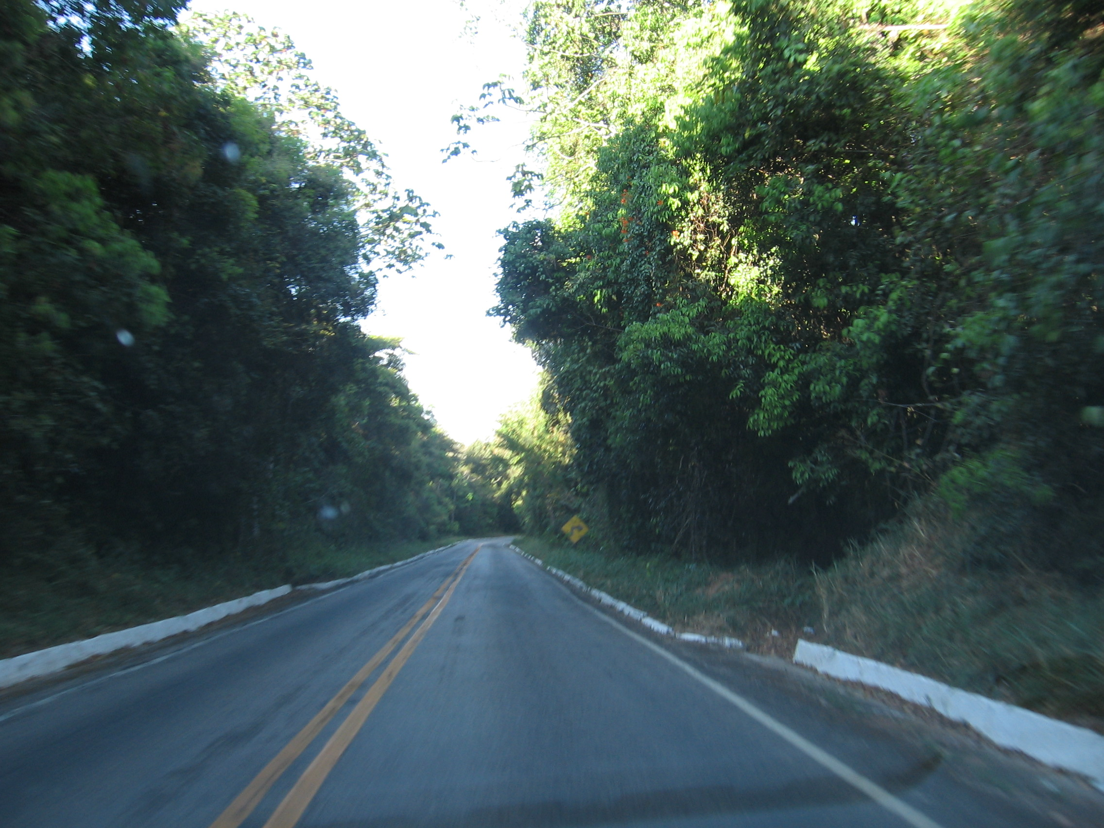 Floresta Nacional do Araripe-Apodi - Brasil